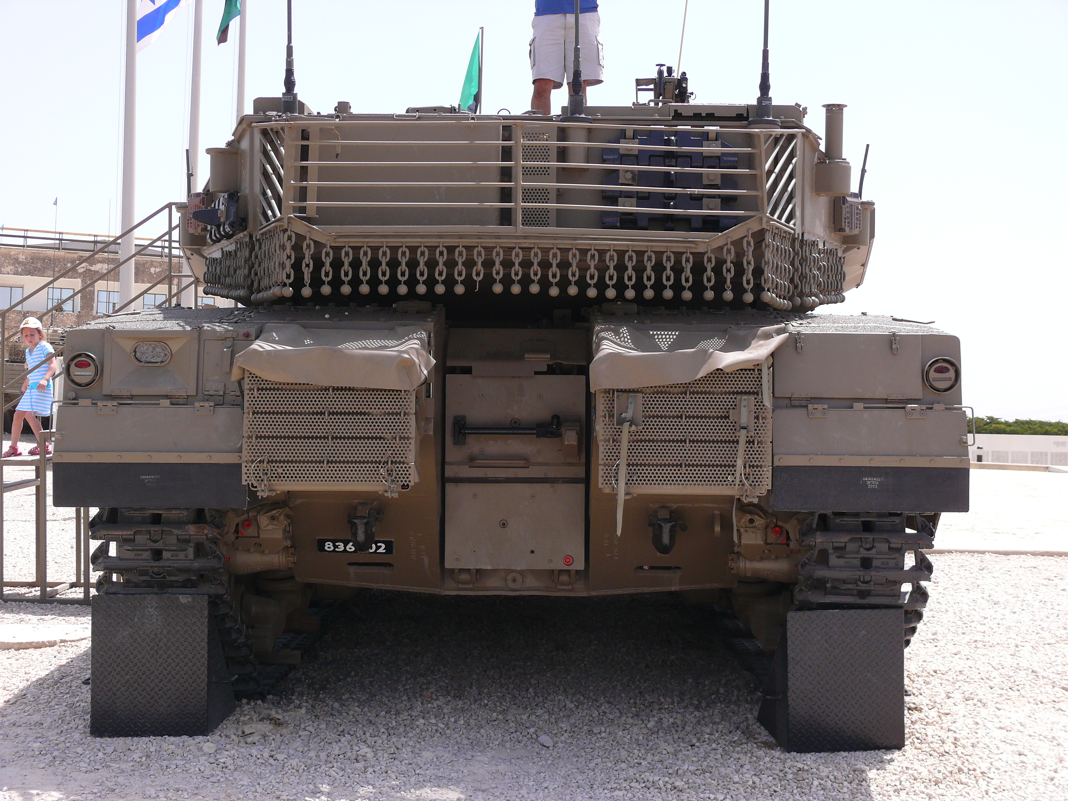 Merkava tank Mk4 in Yad LaShirion, Latrun, Israel טנק מרכבה סימן 4 ביד לשריון, לטרון, ישראל